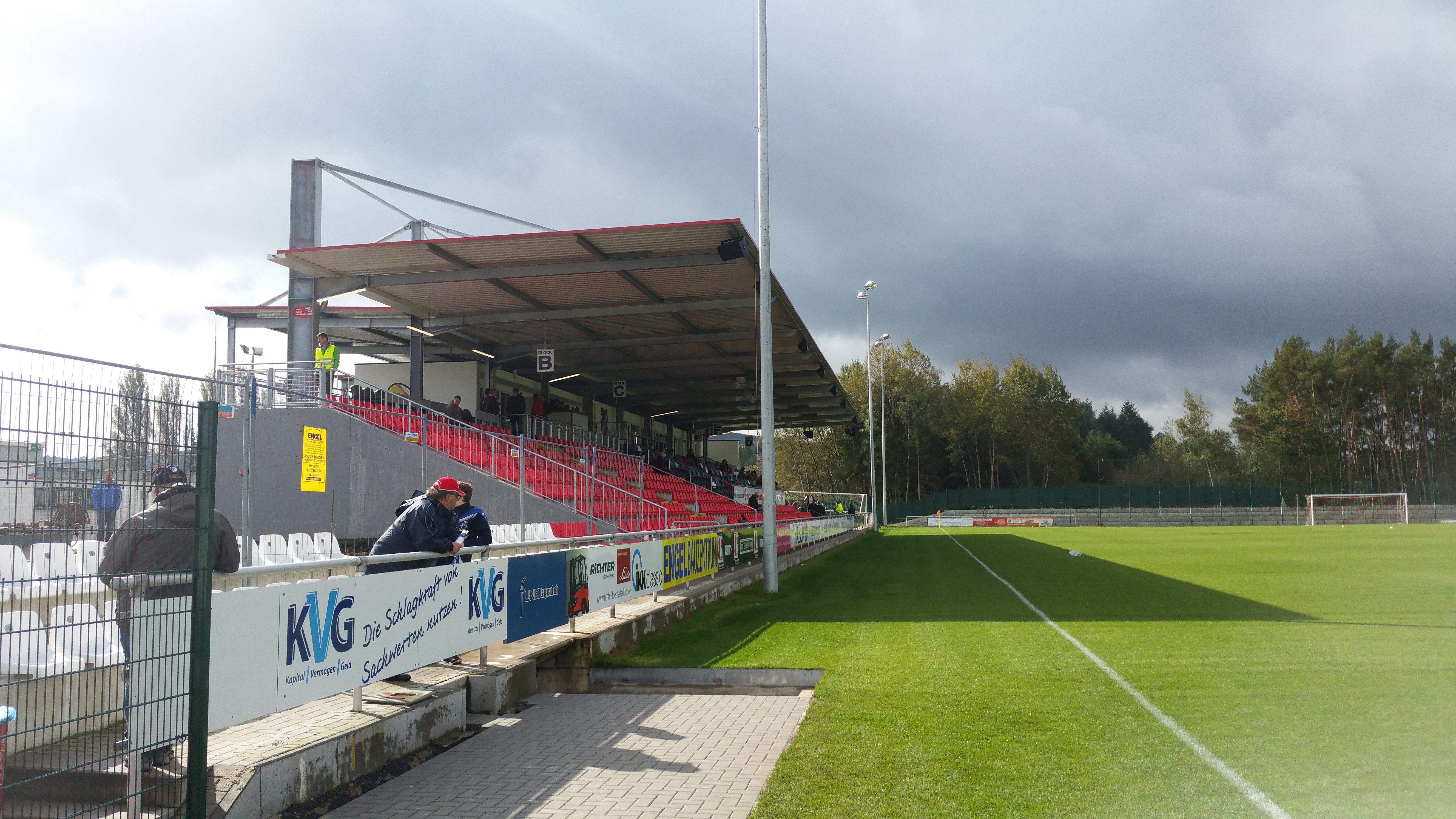 Sportzentrum Haarwasen, Haiger, 3. Oktober 2017